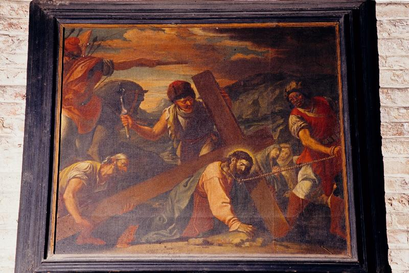 Peinture à l'huile sur toile 150x200 cm Misure cm 150.0x200.0 (HxL) de Buffetti Lodovico, ambito veneto Sujet : Jésus tombe sous la Croix